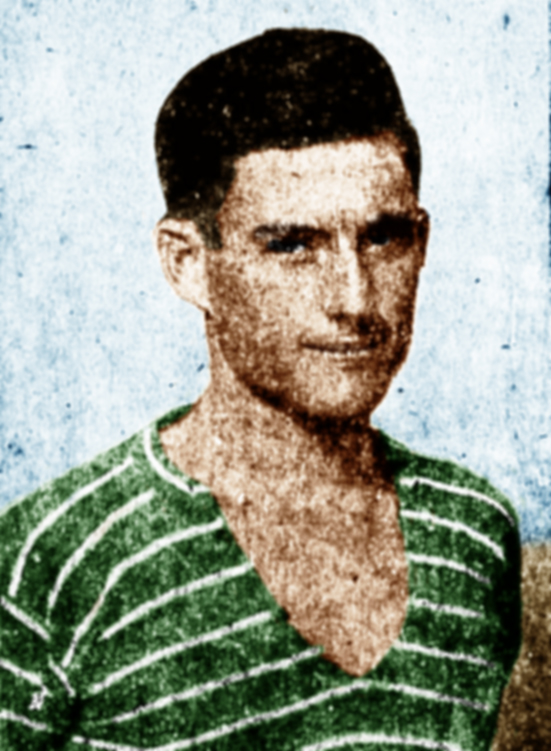 Ο Άγγελος Μεσσάρης το 1930. Χρωματική επεξεργασία user Sportingn